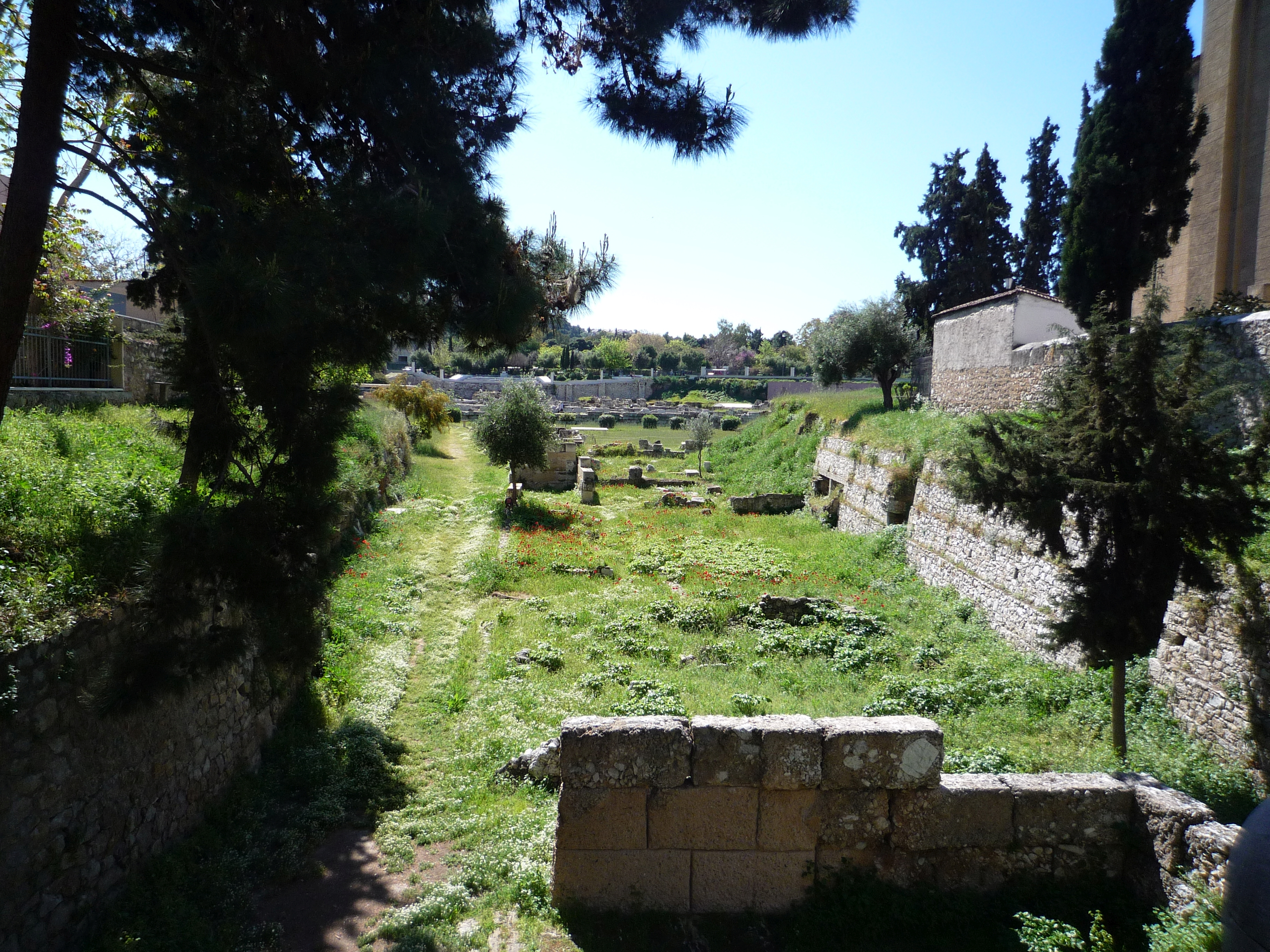 20140412 13 Athens Keramikos